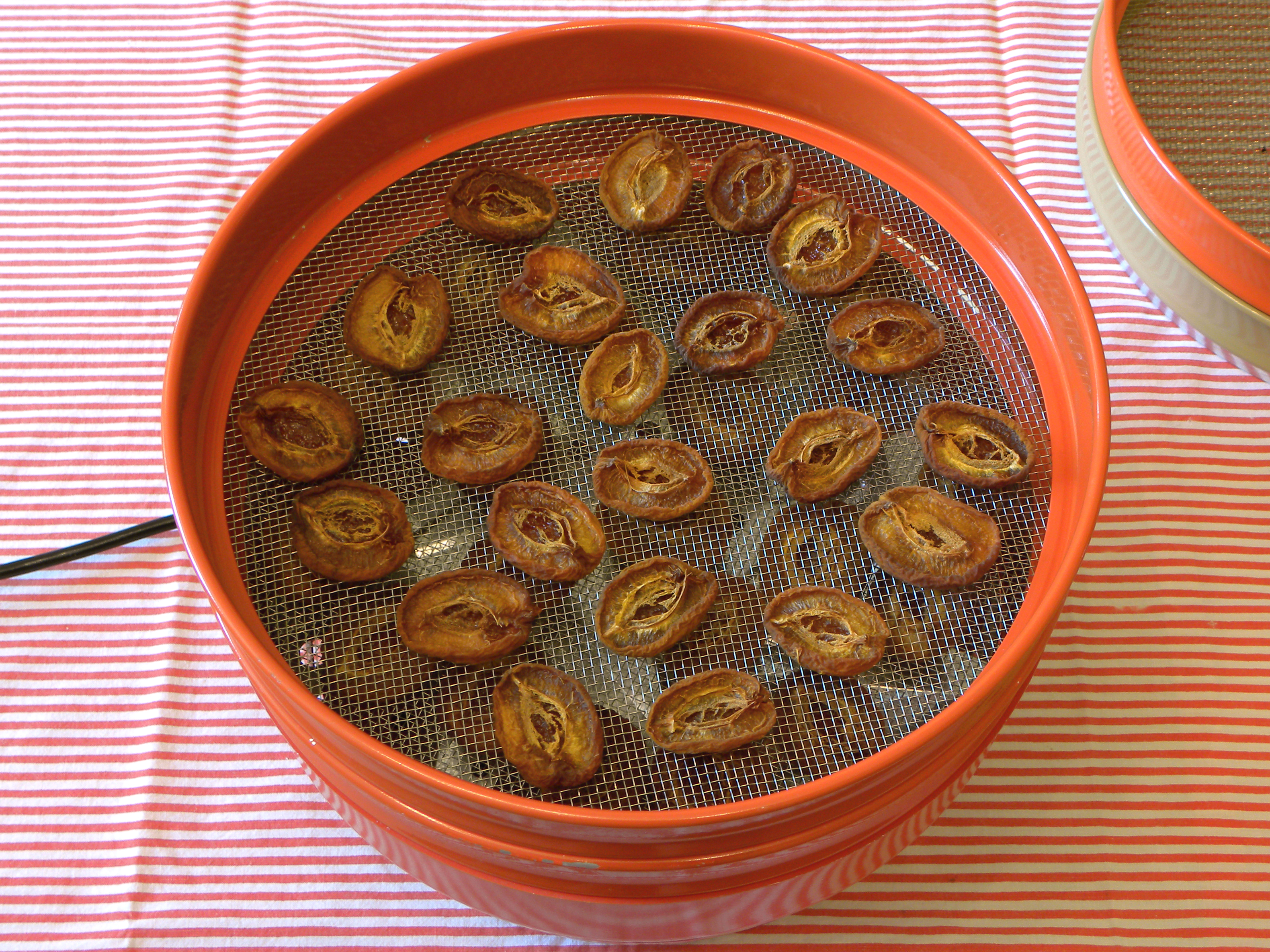 Marillen (Aprikosen) während des Dörrens auf einem Dörrgerät von SIGG.